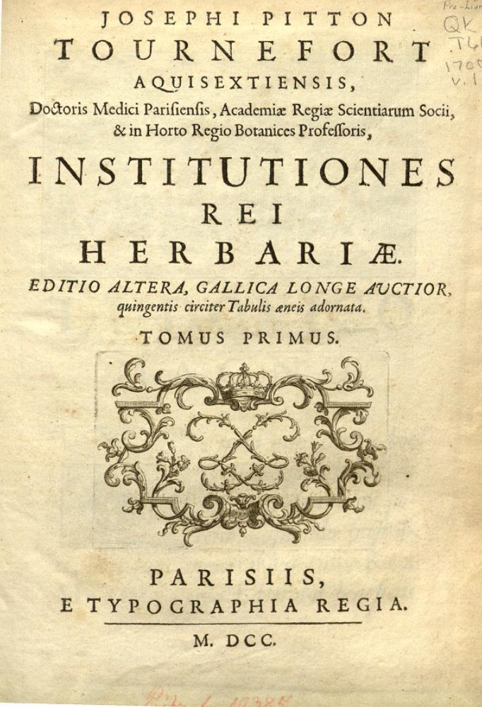 Page de titre de Institutiones rei herbariae, editio altera de Joseph Pitton de Tournefort (1656-1708).